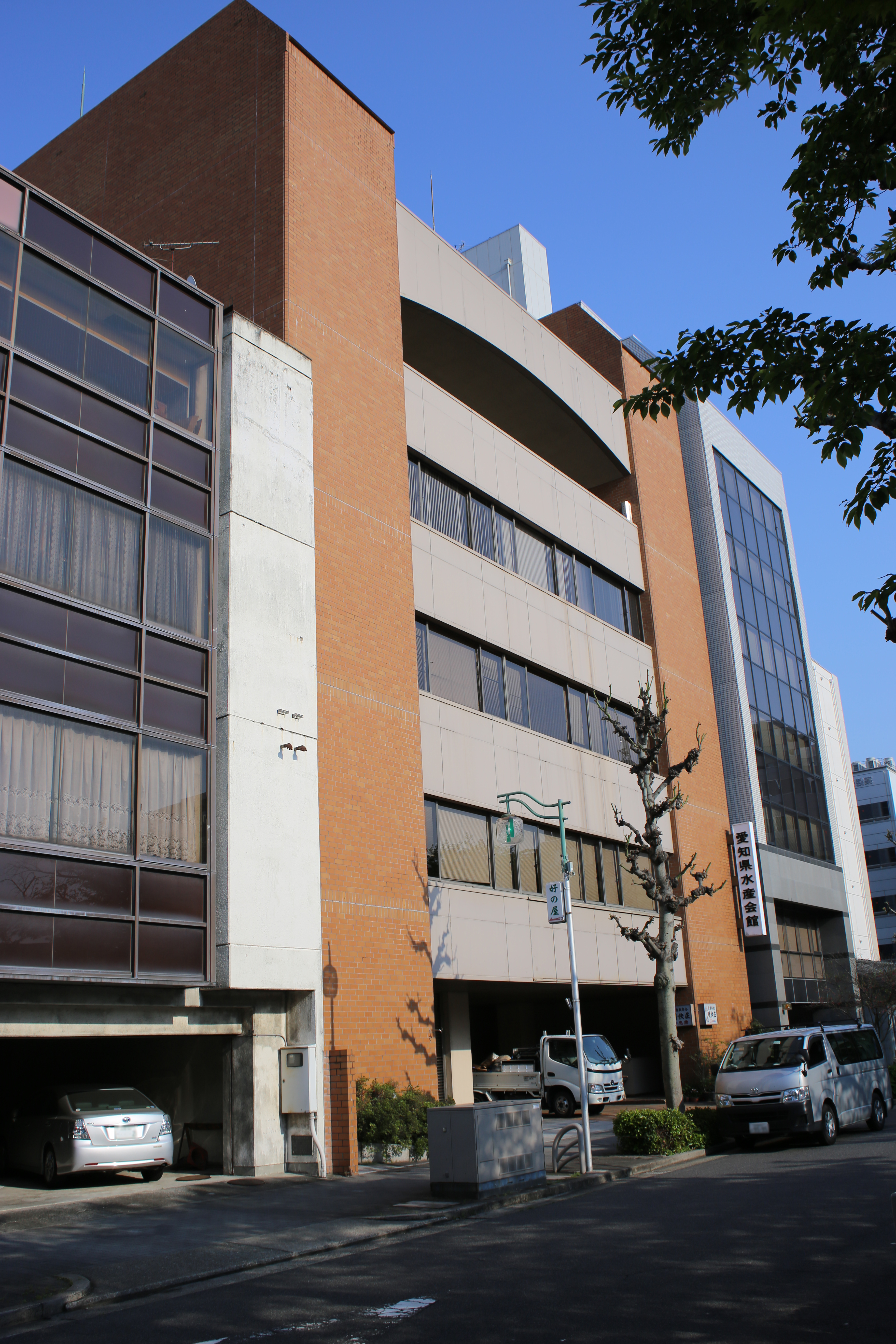 名古屋市中区丸の内三丁目の愛知県水産会館を西側公道北側より撮影。ただし、ナンバープレートにつき画像処理済み。